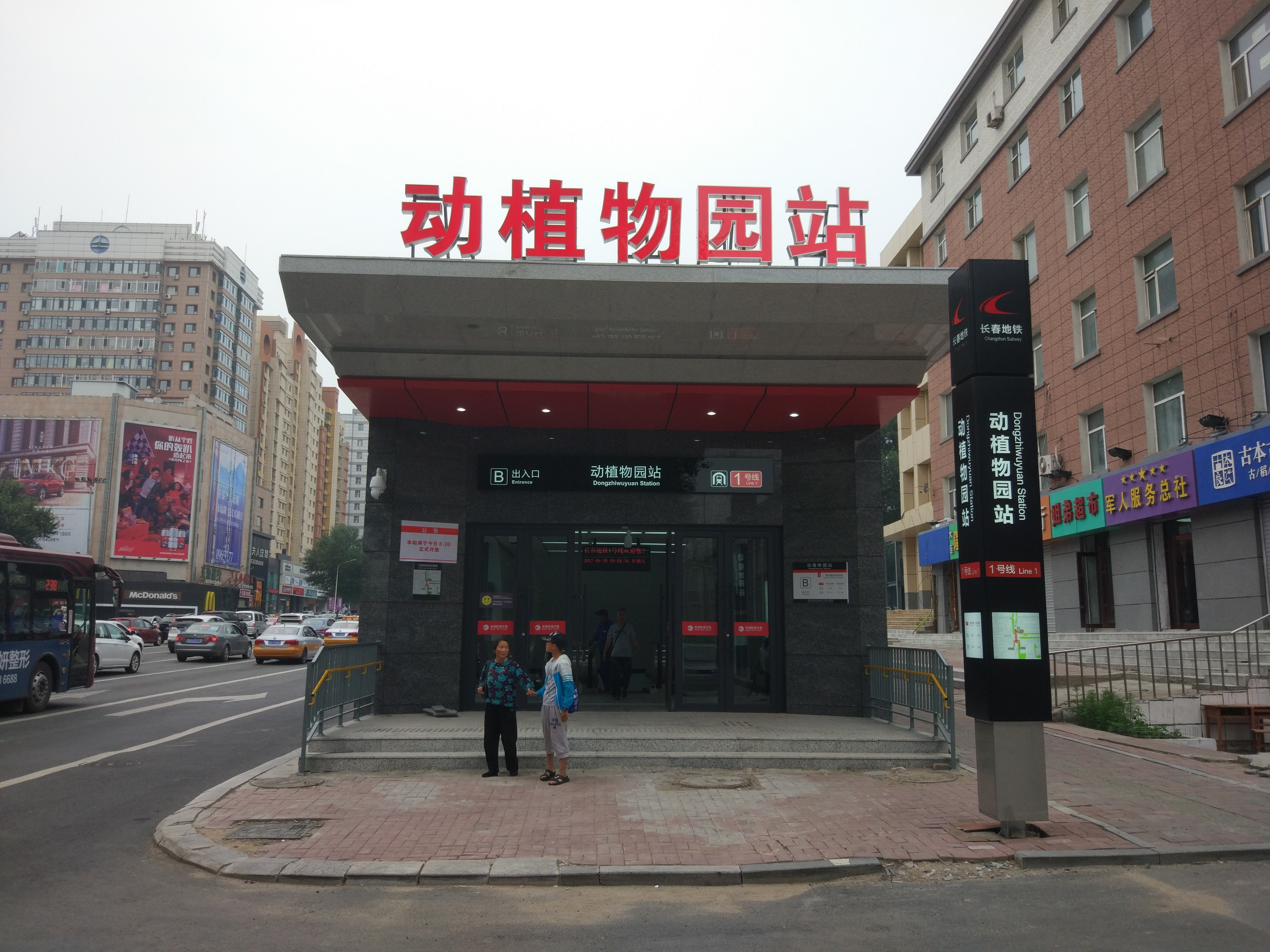 长春地铁自由大路站B出入口